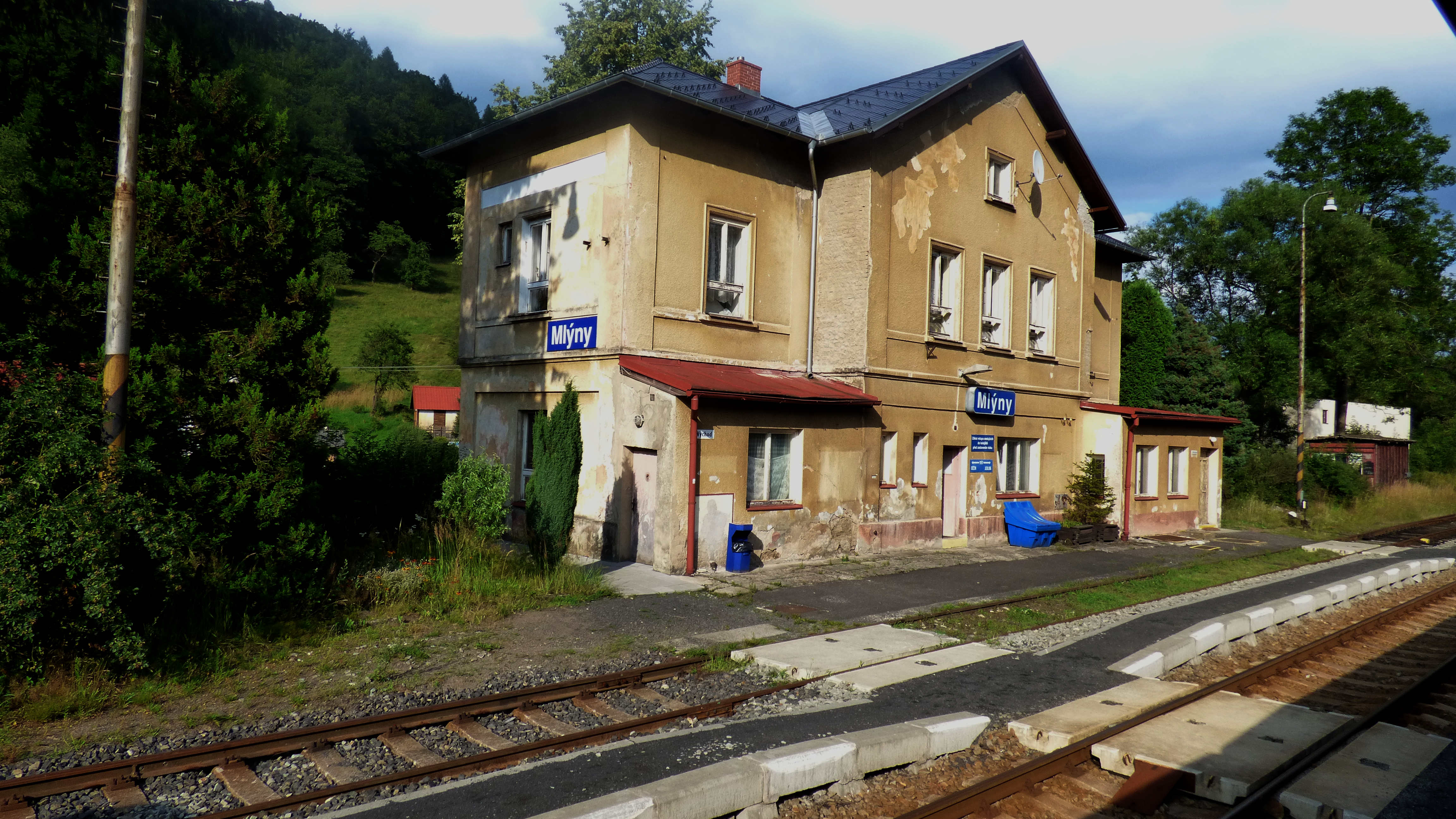 Z Rybniště do Děčína